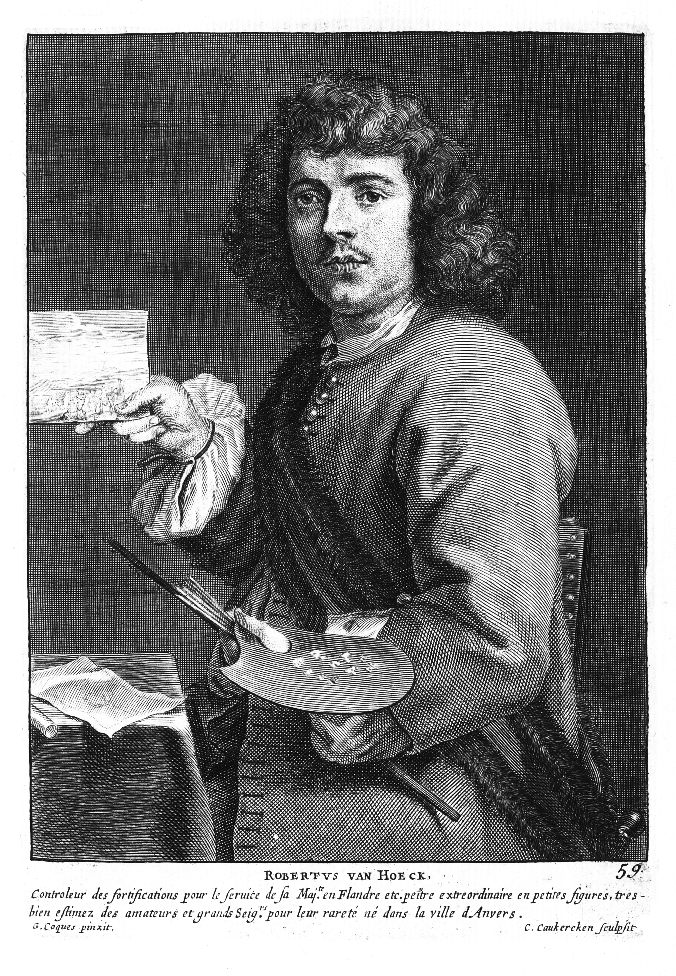 Portrait of Robert van den Hoecke in Cornelis de Bie's Gulden Cabinet.